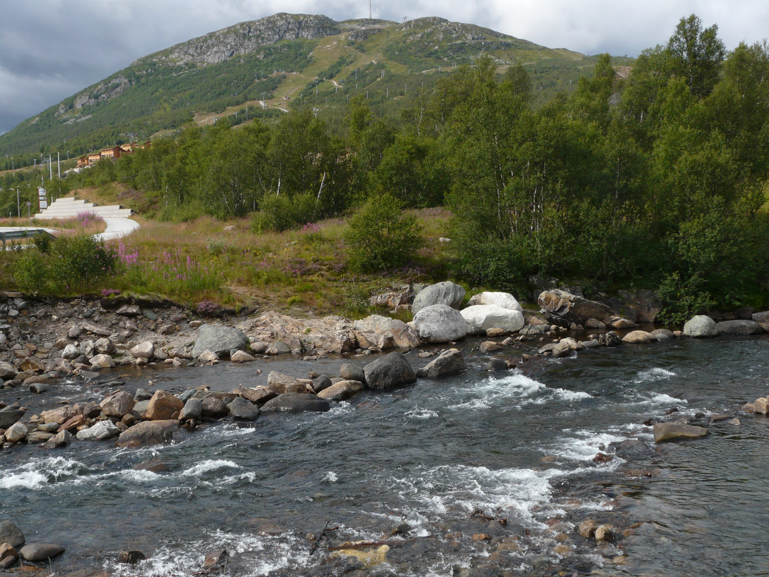 Hovdenin laskettelurinteet kesäaikaan.